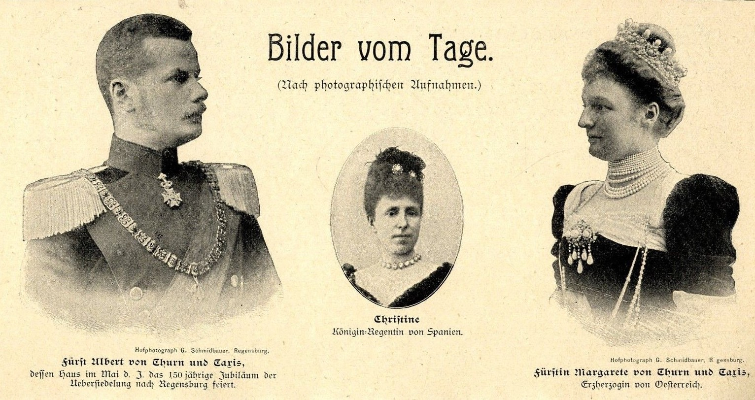 Fürst Albert und Fürstin Margarete von Thurn und Taxis, 1899. Dazwischen Christine, Königin-Regentin von Spanien